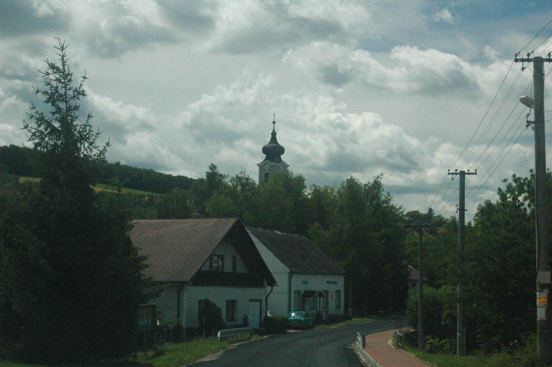 Cerová